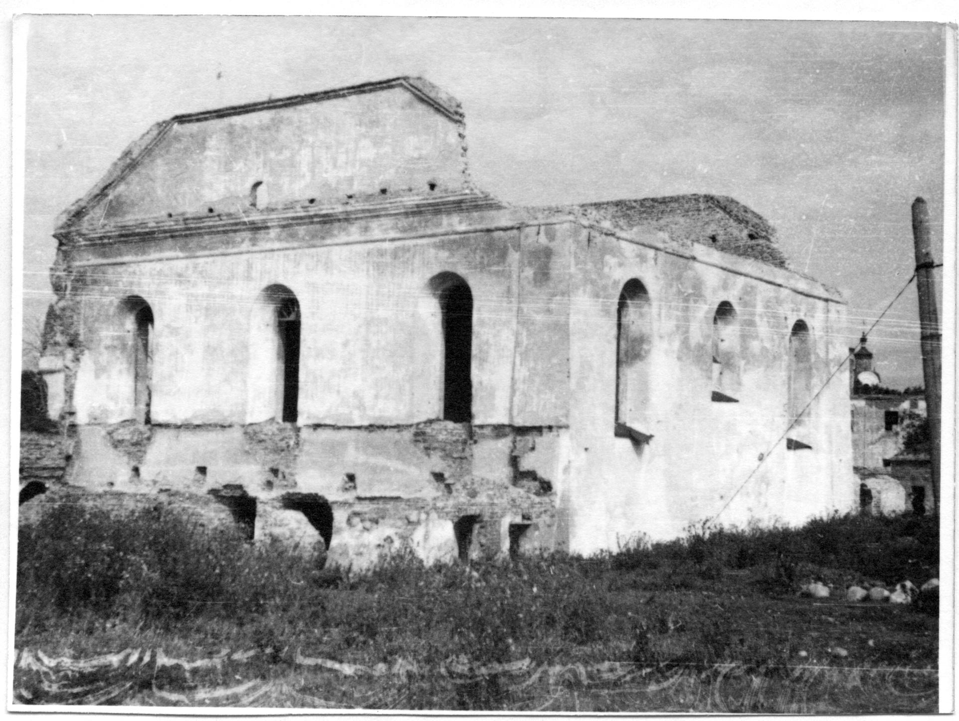 Беларуская (тарашкевіца): Наваградак (Navahradak), завулак Сынагогальны (zavułak Synagogalny). Вялікая Сынагога